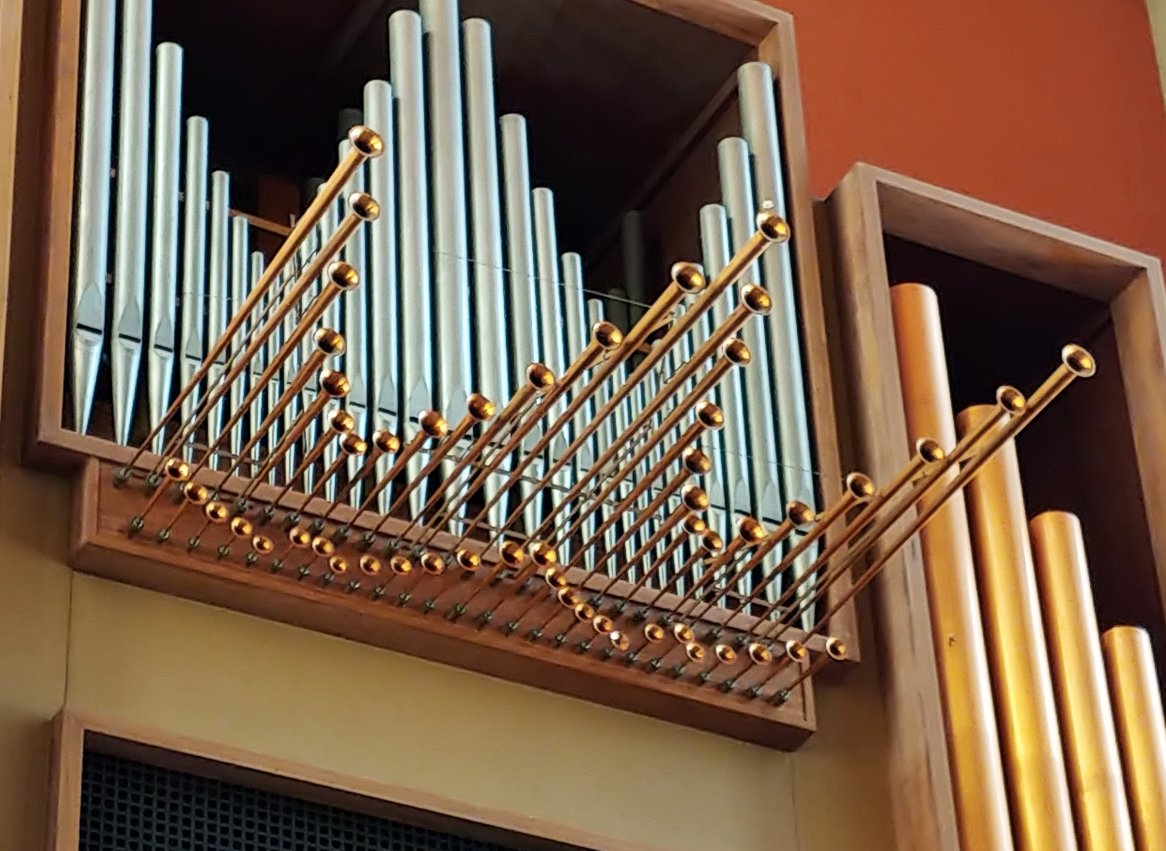 Le canne del registro Tromba orizzontale 8'.